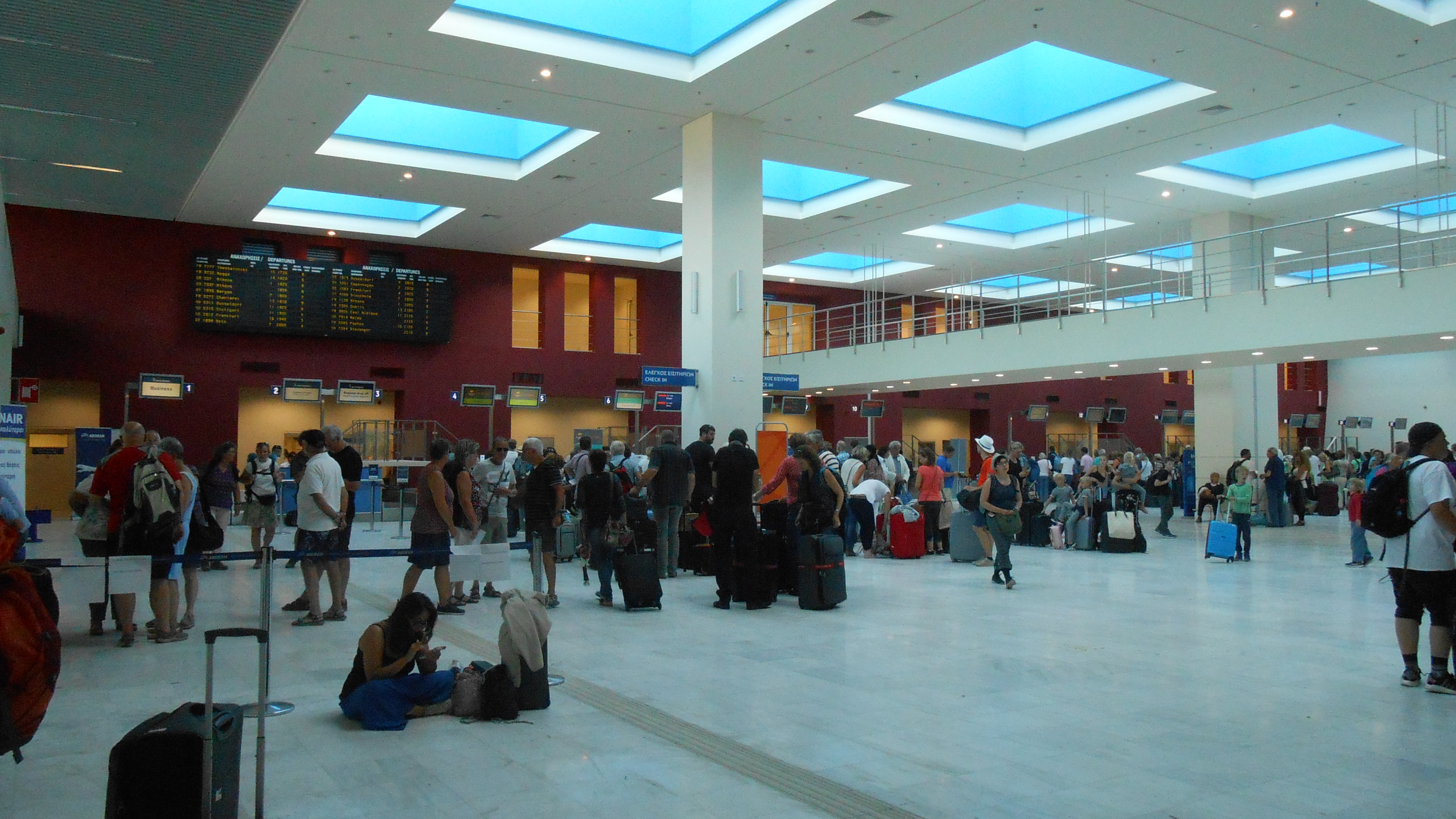 Abfertigungsschalter in der Abflughalle des Flughafens von Chania.